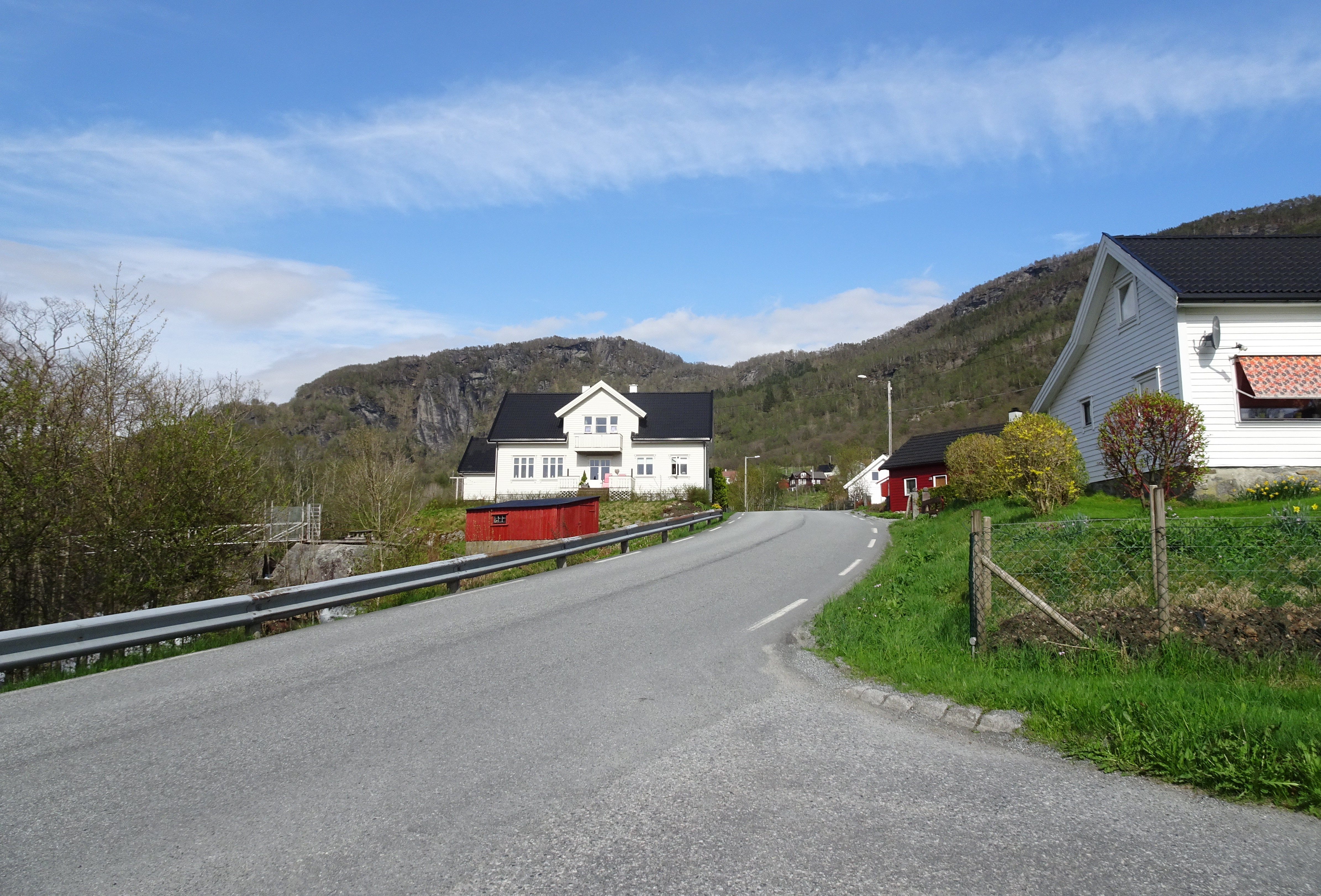 Movegen (fylkesvei 745) i Vikedal